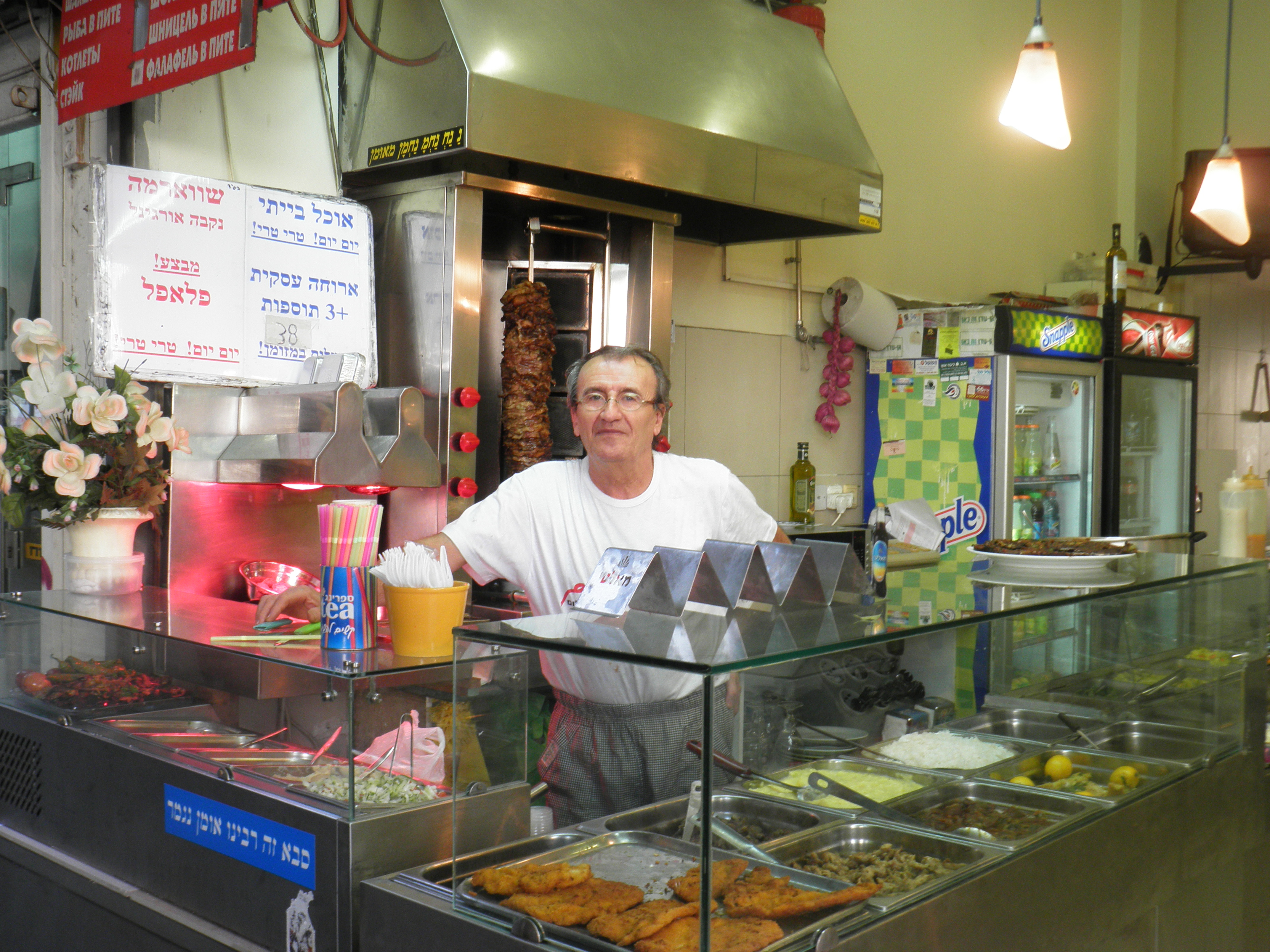 דוד זריפין מבעלי דוכן השווארמה באלנבי פינת מונטפיורי בתל אביב בה הוטמן תיק ובו מטען חבלה ב- 28/2/2001